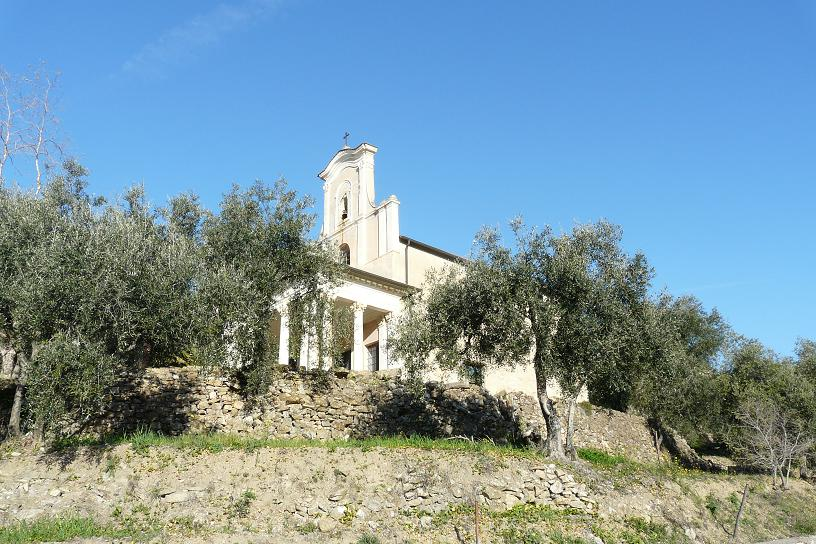 Chiesa di San Rocco, Diano Borello, Liguria, Italia